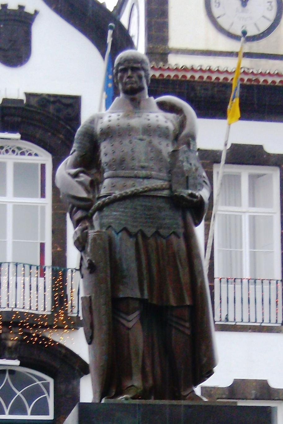 Estátua de Gonçalo Vaz Botelho, Vila Franca do Campo, ilha de são Miguel, Açores. Autor: Ernesto Canto Faria e Maia, 1954